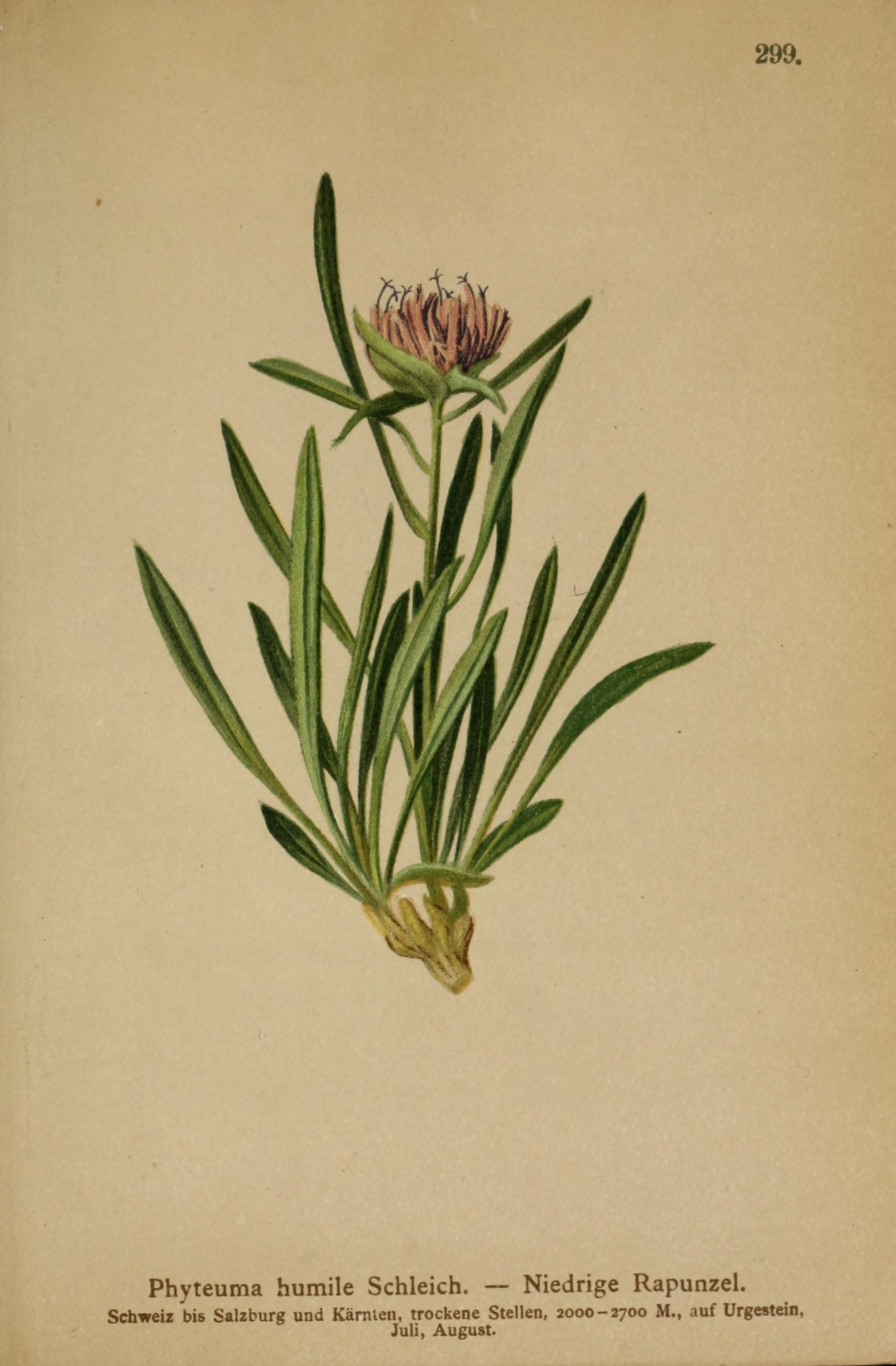 Atlas der Alpenflora / herausgegeben vom Deutschen und Oesterreichischen Alpenverein ; nach der Natur gemalt von Anton Hartinger ; mit Text von K.W. v. Dalla Torre.